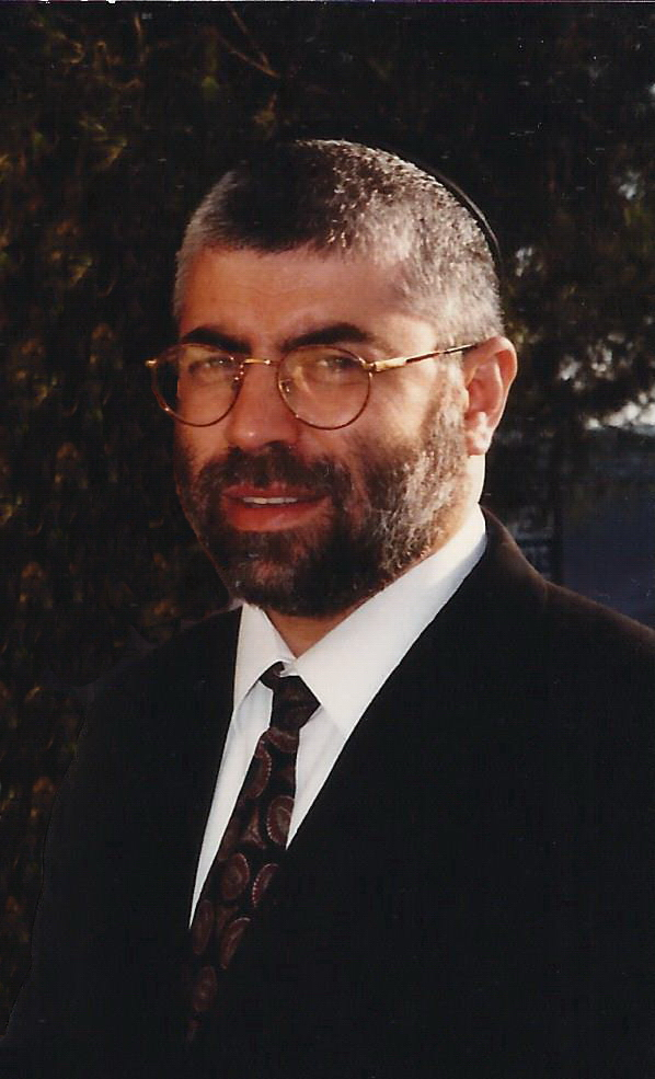 הרב שלמה בניזרי בברכת רם